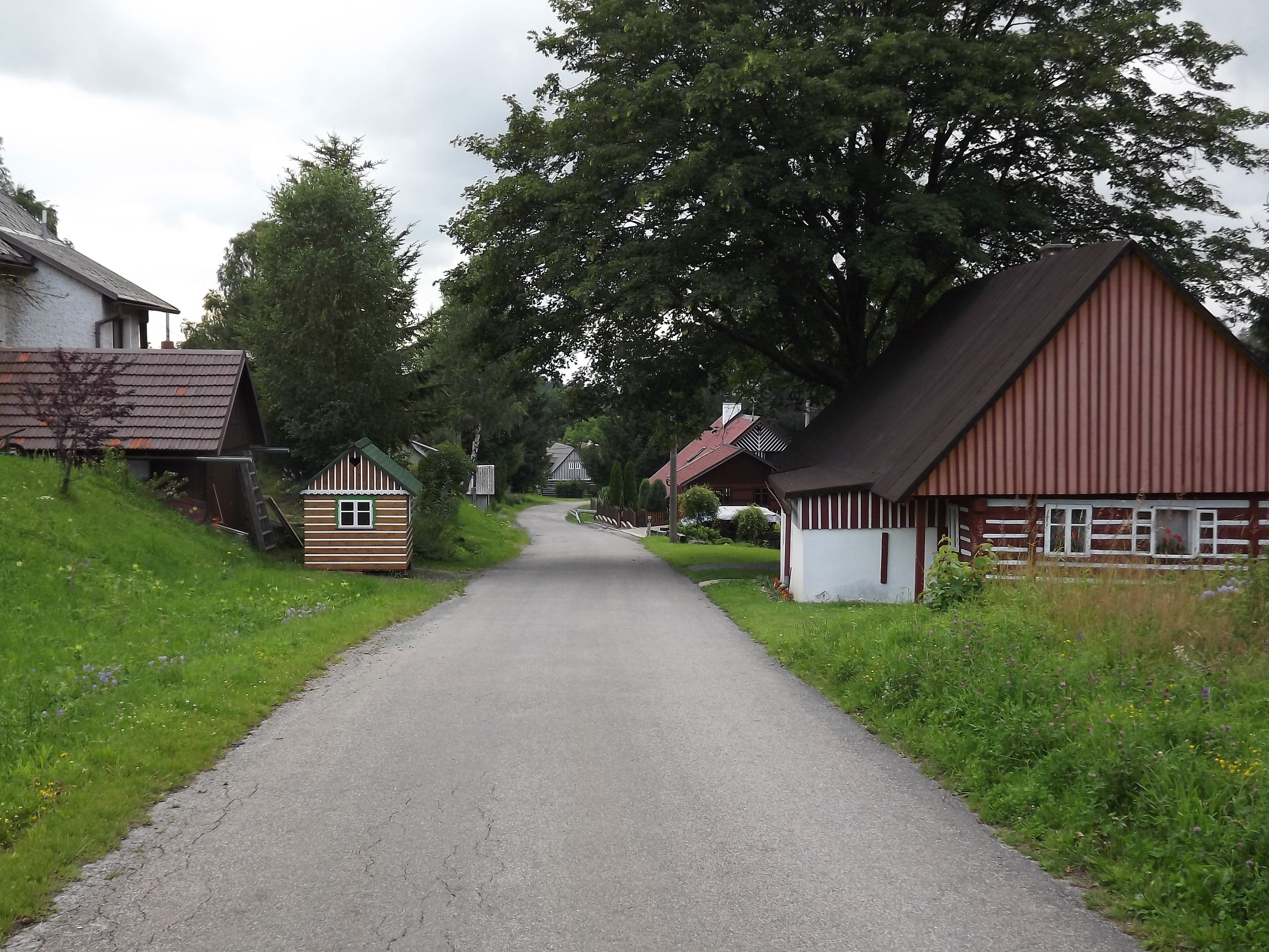 Ulice